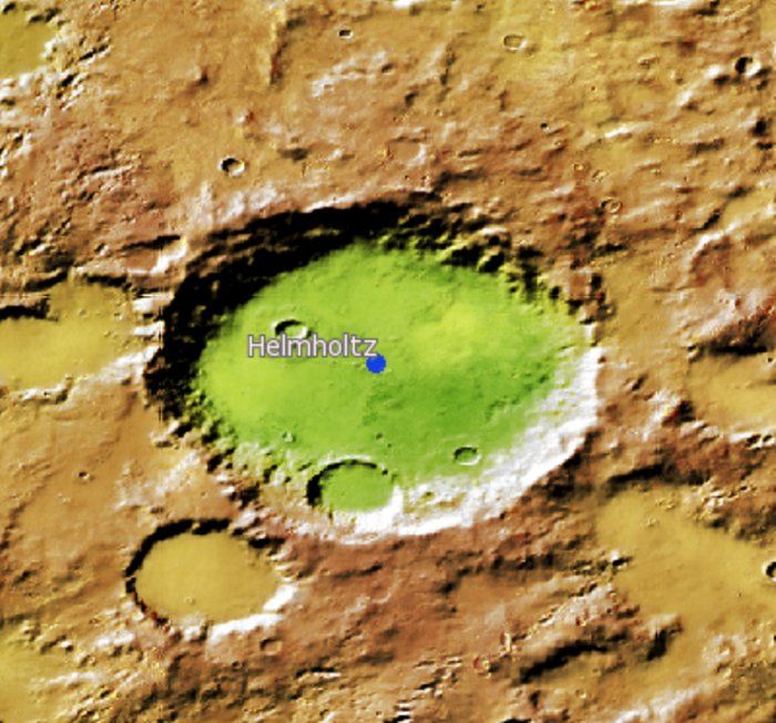 Cráter marciano Helmholtz. (Imagen IAU/USGS/Goddard/A SU/USGS)